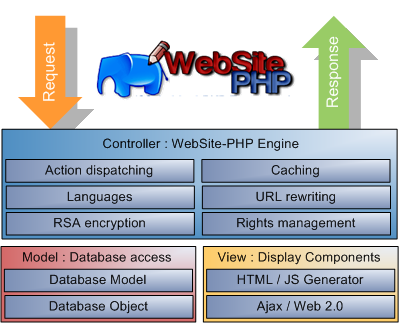 WebSite-PHP Schema MVC